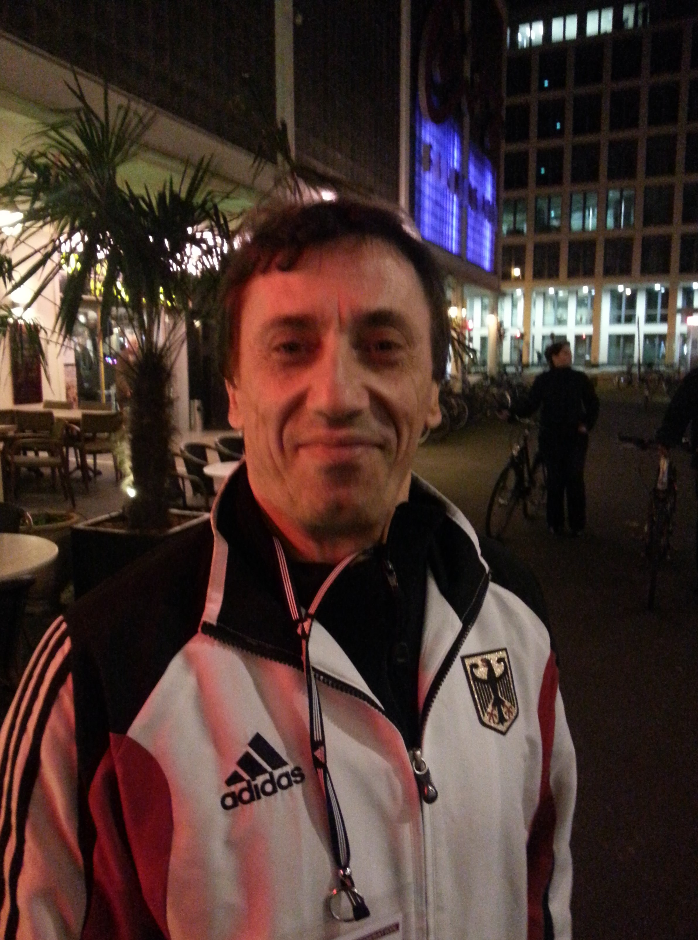 Kata-Bundestrainer Eftimios Karamitsos